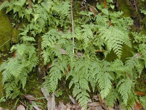 CC-BY Creative Commons Attribution License 3.0 [Information] Images created by Forest Starr and Kim Starr are licensed under a Creative Commons Attribution 3.0 License, permitting sharing and adaptation with attribution.